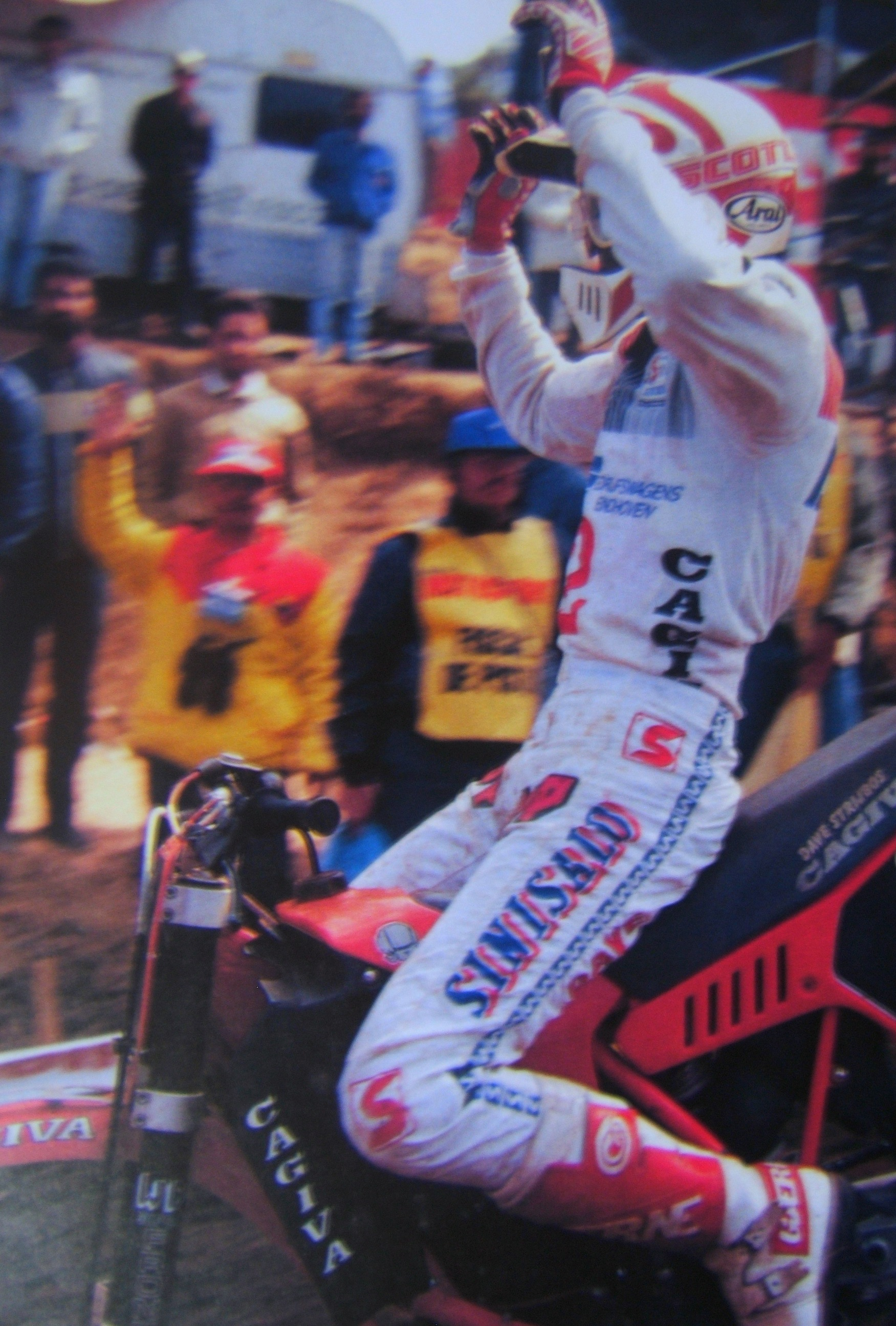 Dave Strijbos: vreugde na eerste wereldtitel.